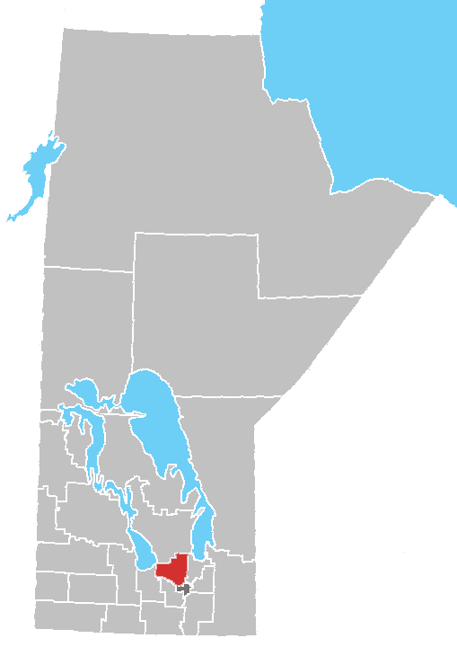 Manitoba census area No. 14